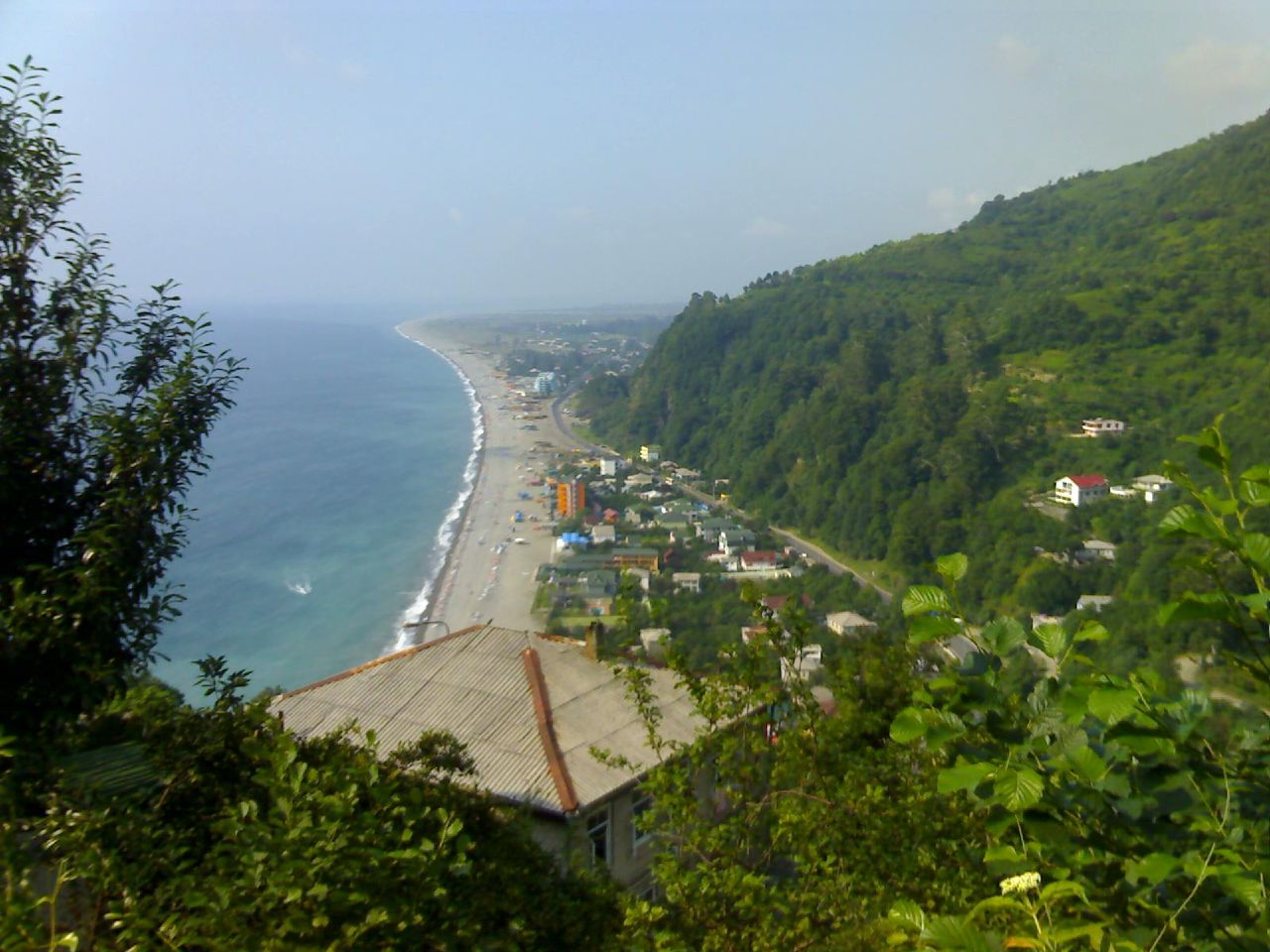 Batumi, Adjara